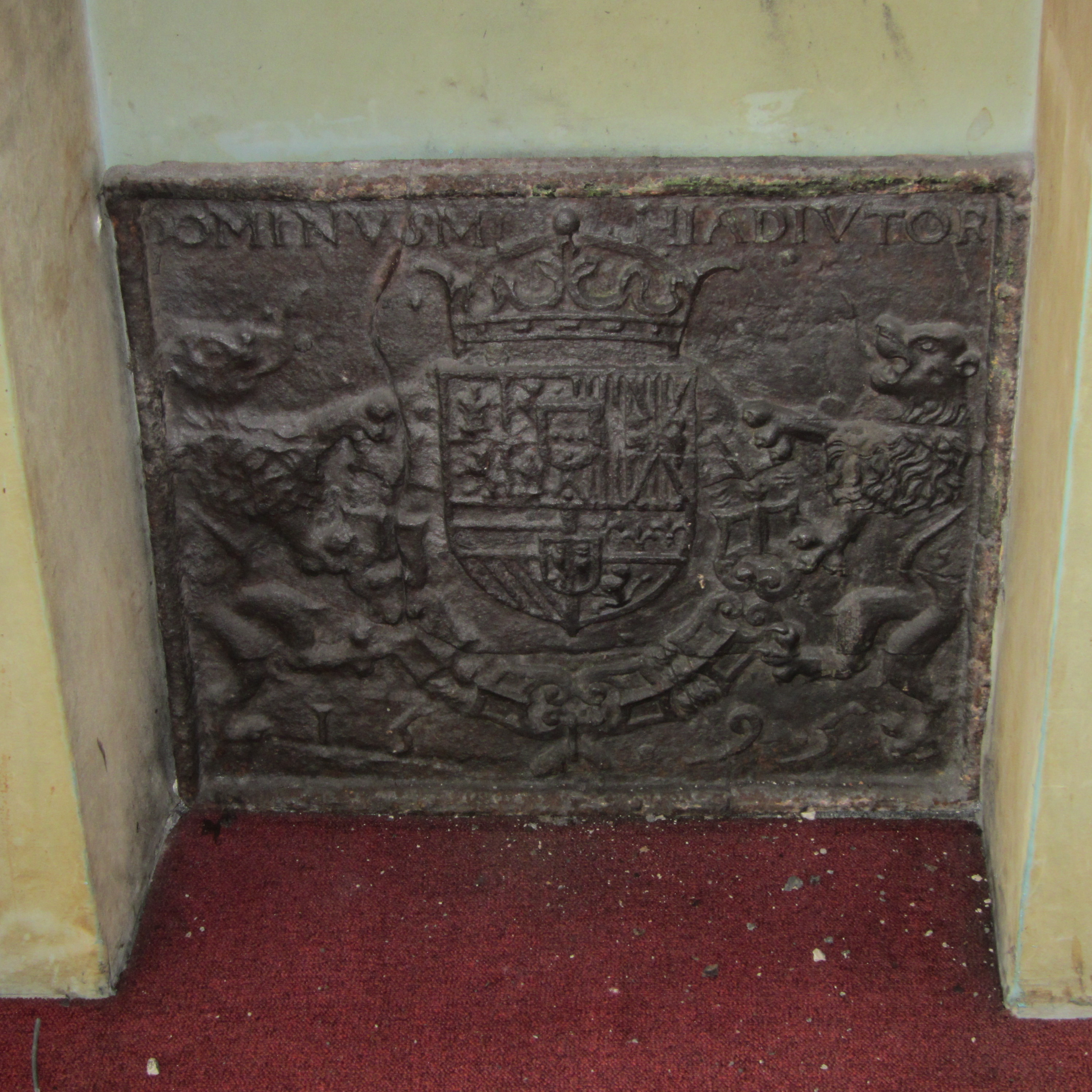 Haardplaat in Gentse stadswoning, Gent, België